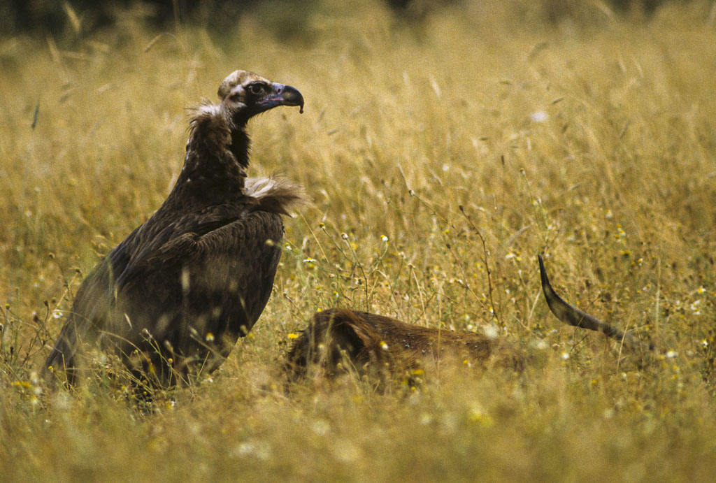 Aegypius monachus, Extremadura, Spain